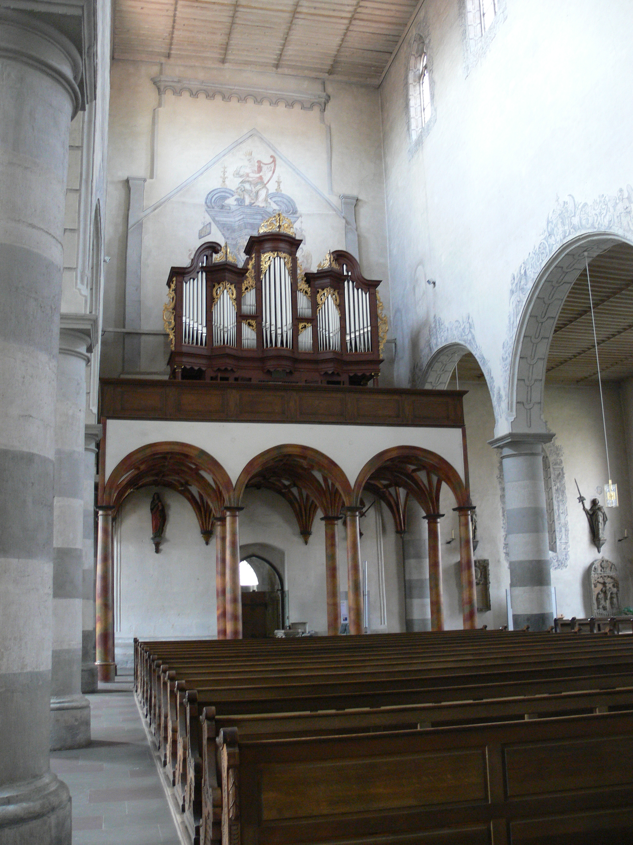 Stadtpfarrkirche St. Maria Magdalena, Münnerstadt Blick zur Orgelempore